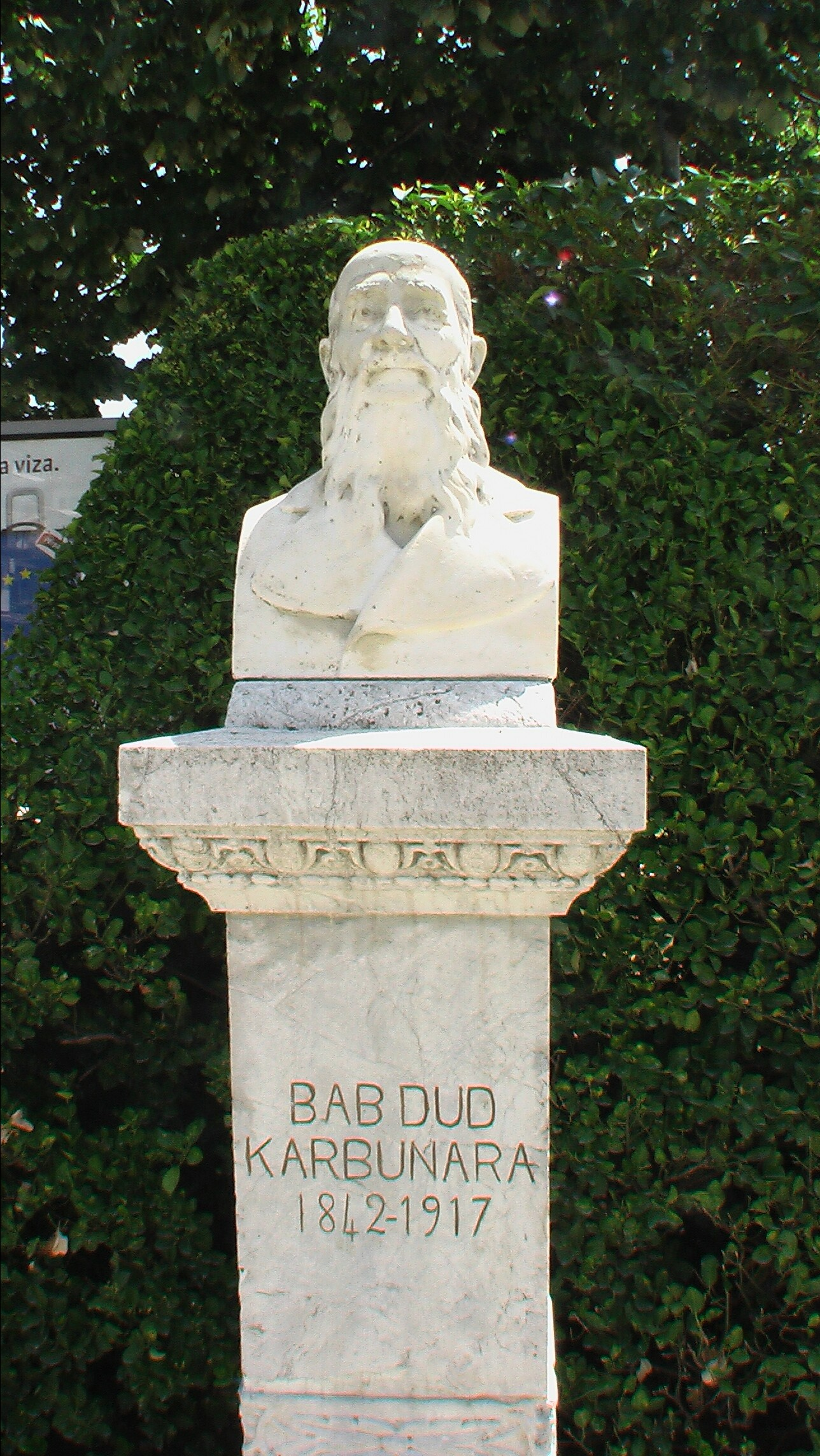 Berat Babë Dudë Karbunara